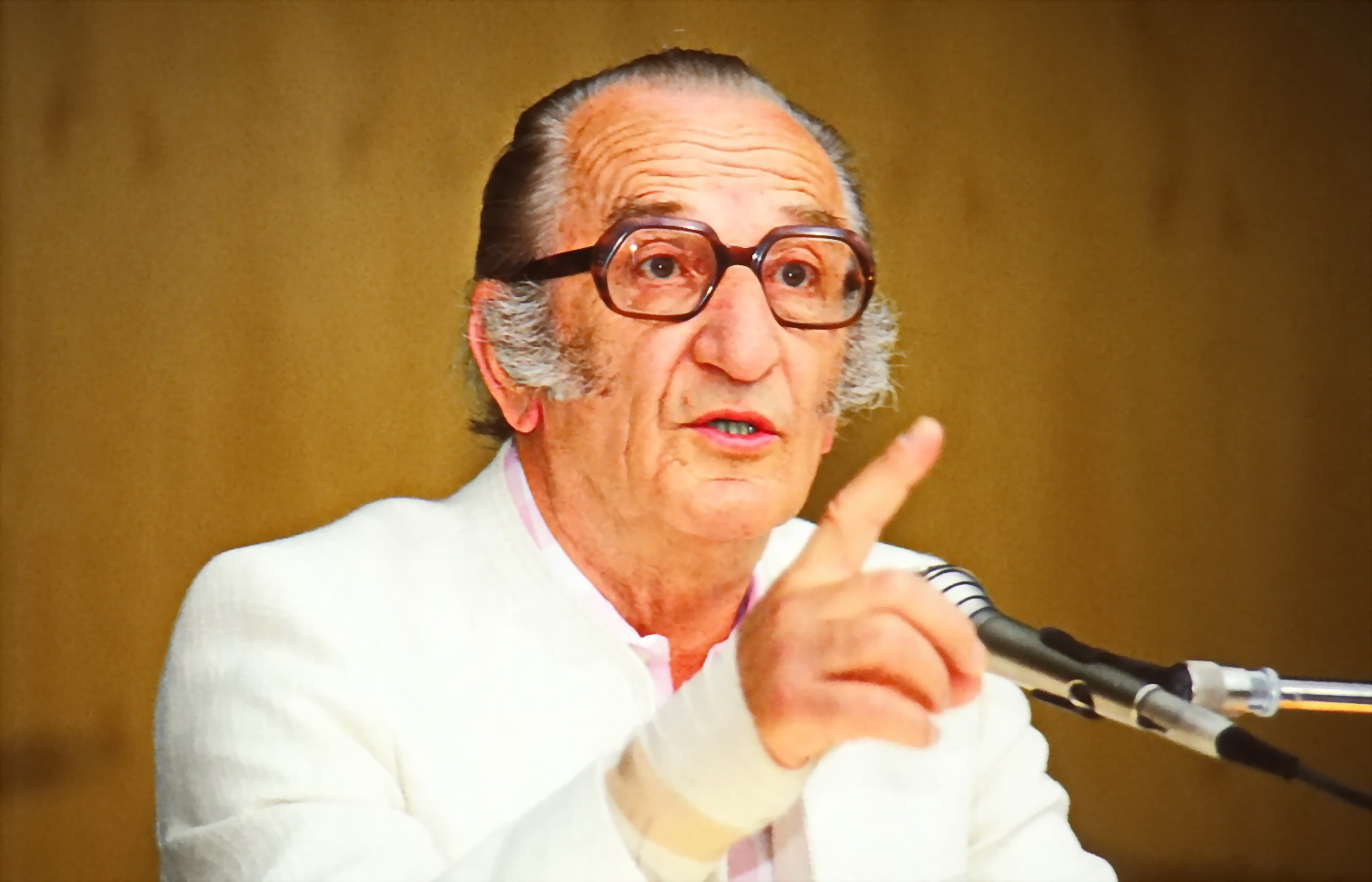 Carl Oscar Renner